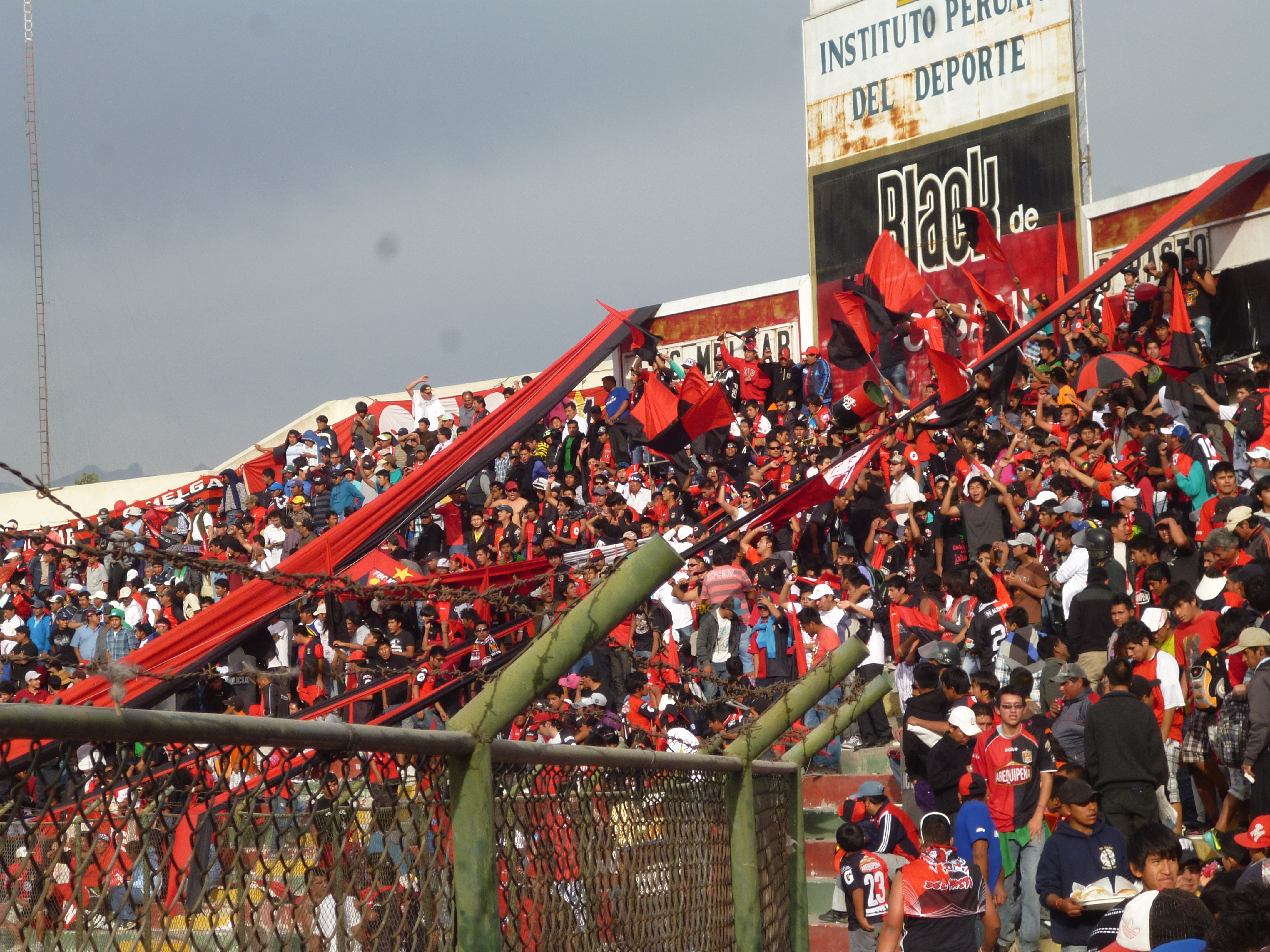 Barra León del Sur del Foot Ball Club Melgar, en la tribuna sur del Estadio Mariano Melgar de Arequipa.